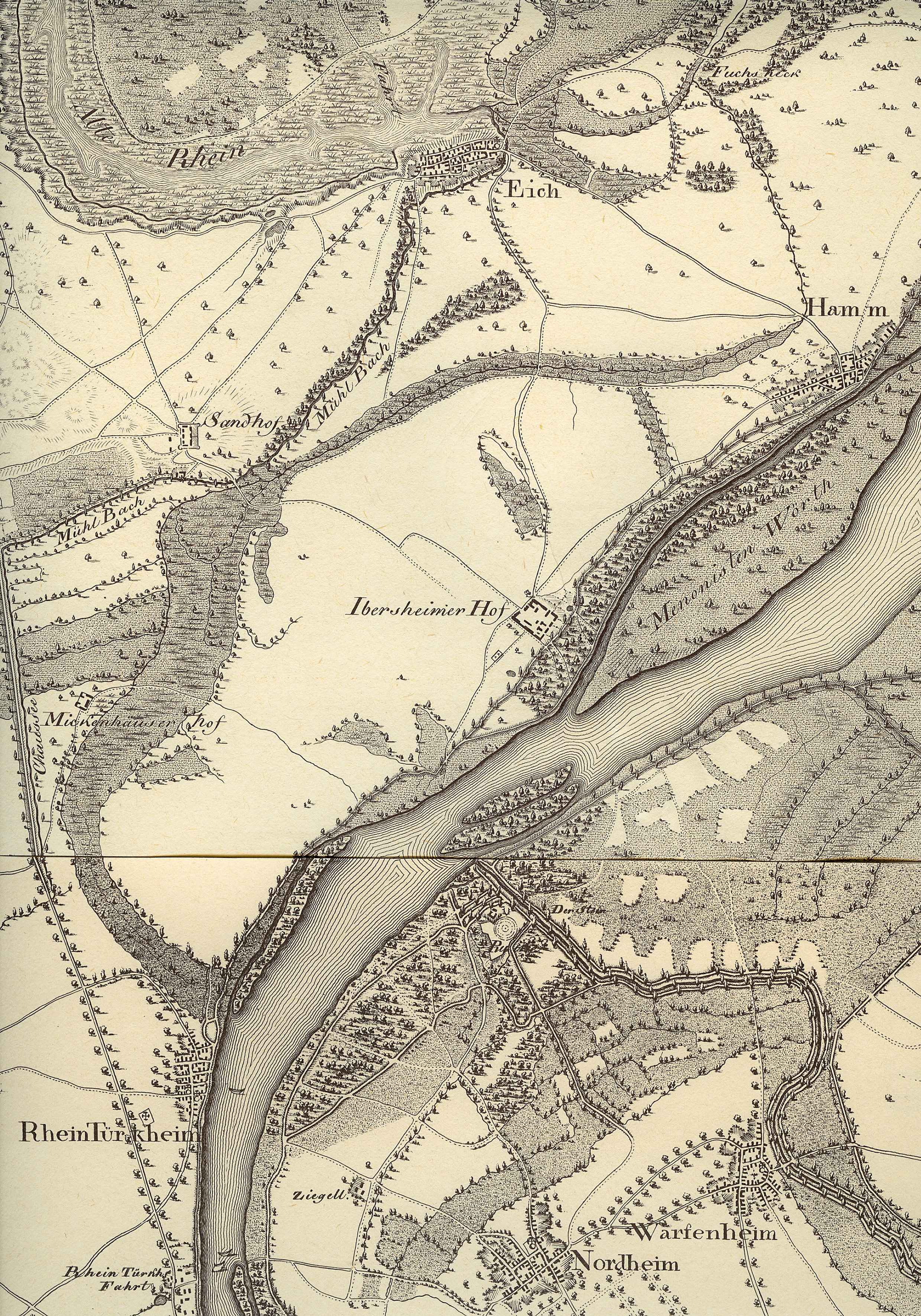 Militärische Situationskarte von 1799 (Haas'sche Karte), Ausschnitt aus den Karten Guntersblum und Worms